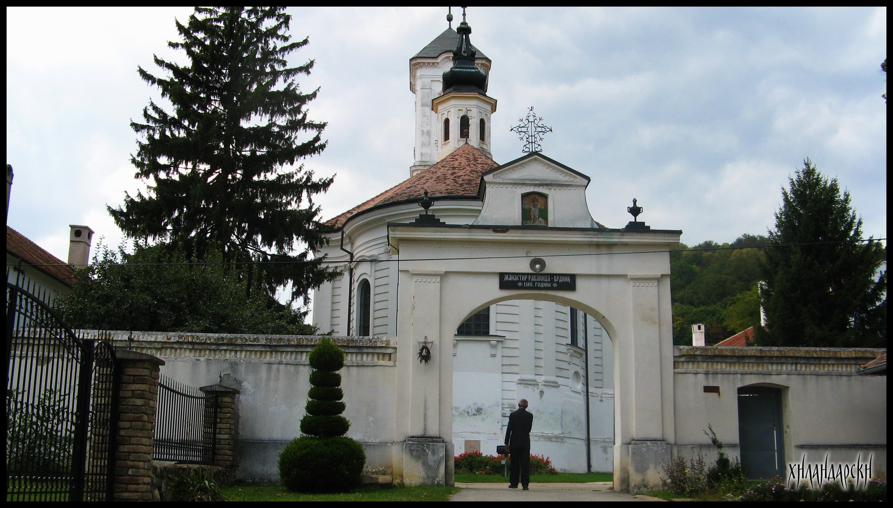 Манастир Врдник - Мала Раваница